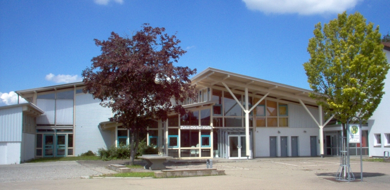 Zehn-Dörfer-Halle in Wald (Hohenzollern)